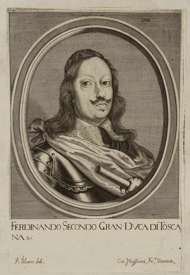 Grafik aus dem Klebeband Nr. 1 der Fürstlich Waldeckschen Hofbibliothek Arolsen Motiv: Ferdinando II. de’ Medici, Großherzog von Toskana